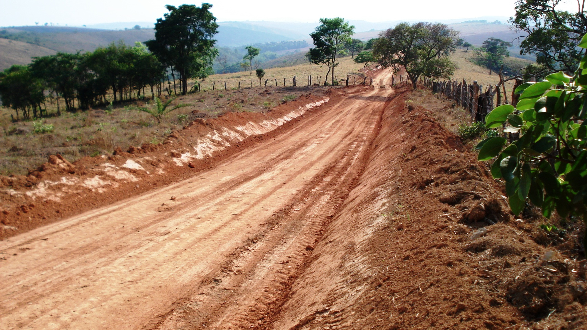 Dirt road